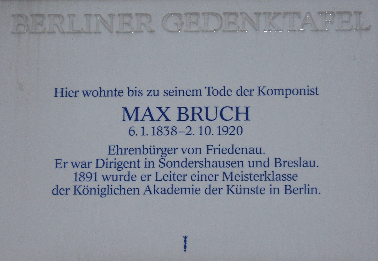 Berliner Gedenktafel in 12159 Berlin-Friedenau, Albestraße 3. Ehemaliges Wohnhaus des Komponisten Max Bruch